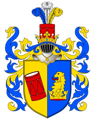 Rodový znak Bubna z Litic.